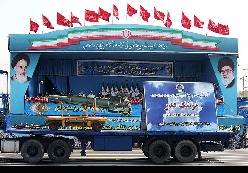 موشک هواپرتاب هدایت شونده اپتیکی قدر با سرجنگی ۹۰۷ کیلوگرمی از حسگر اپتیکی(دوربین نصب شده در دماغه) برای هدفگیری در فاز نهایی برخوردار است. این بمب از فانتوم اف۴ پرتاب میشود